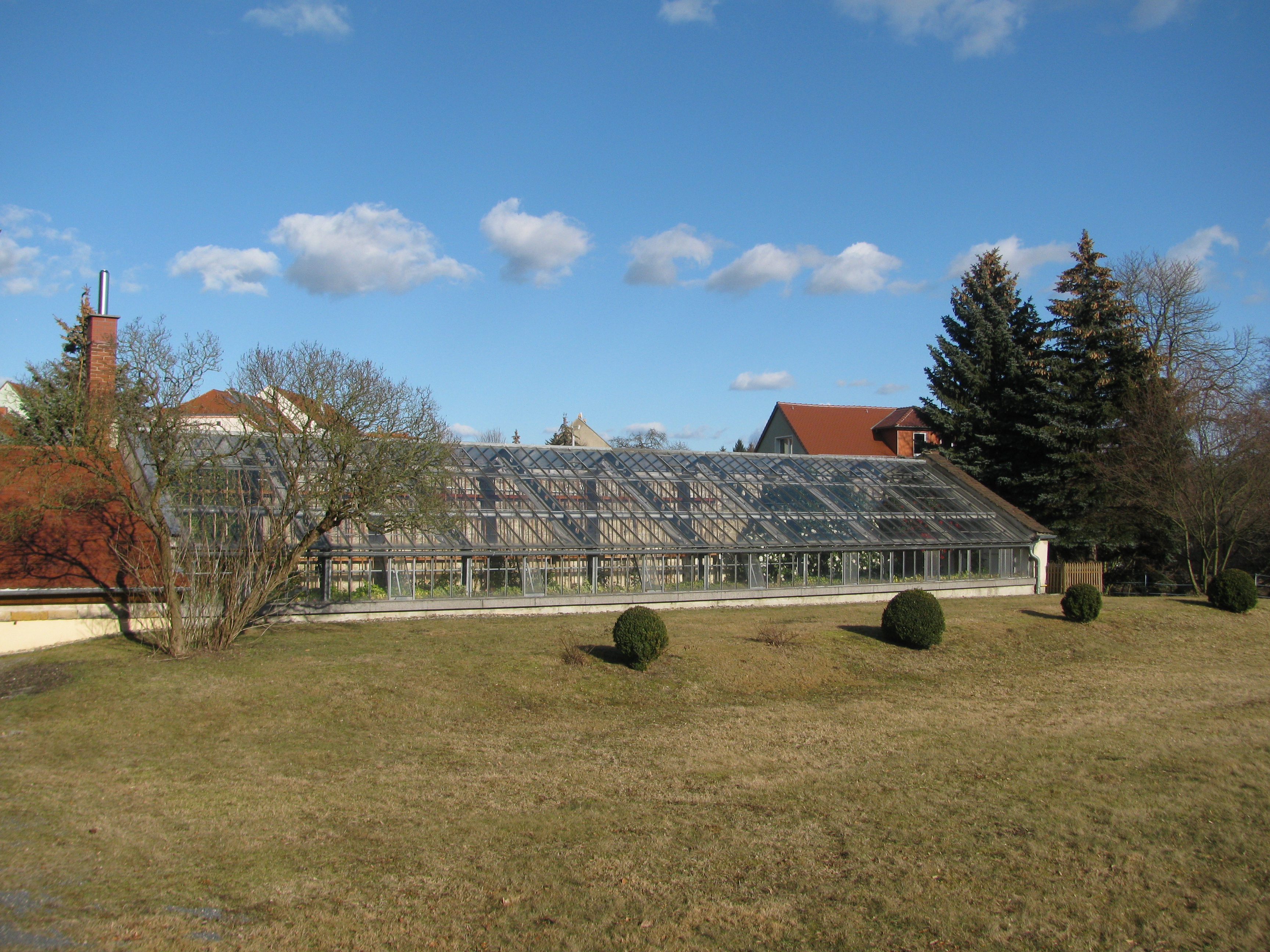 Camellias in Königsbrück, Saxony